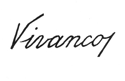 Firma del pintor Miguel García Vivancos Según fotografía de Ernesto Reiner, propietario de un cuadro de Vivancos, y cedida a Cornava para su uso en Wikipedia.